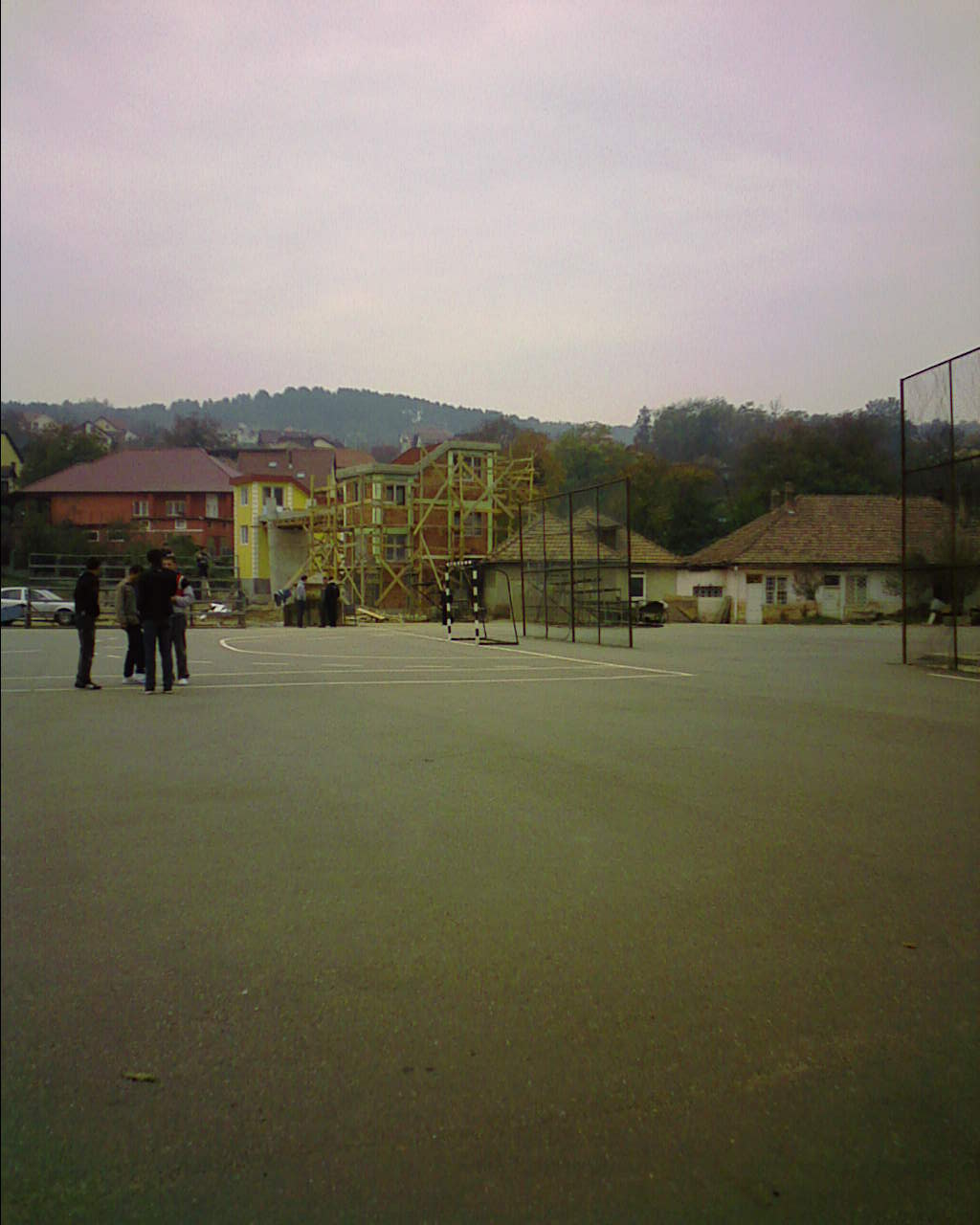 Pasarela către grădina Colegiului Naţional "Silvania" din Zalău în construcţie